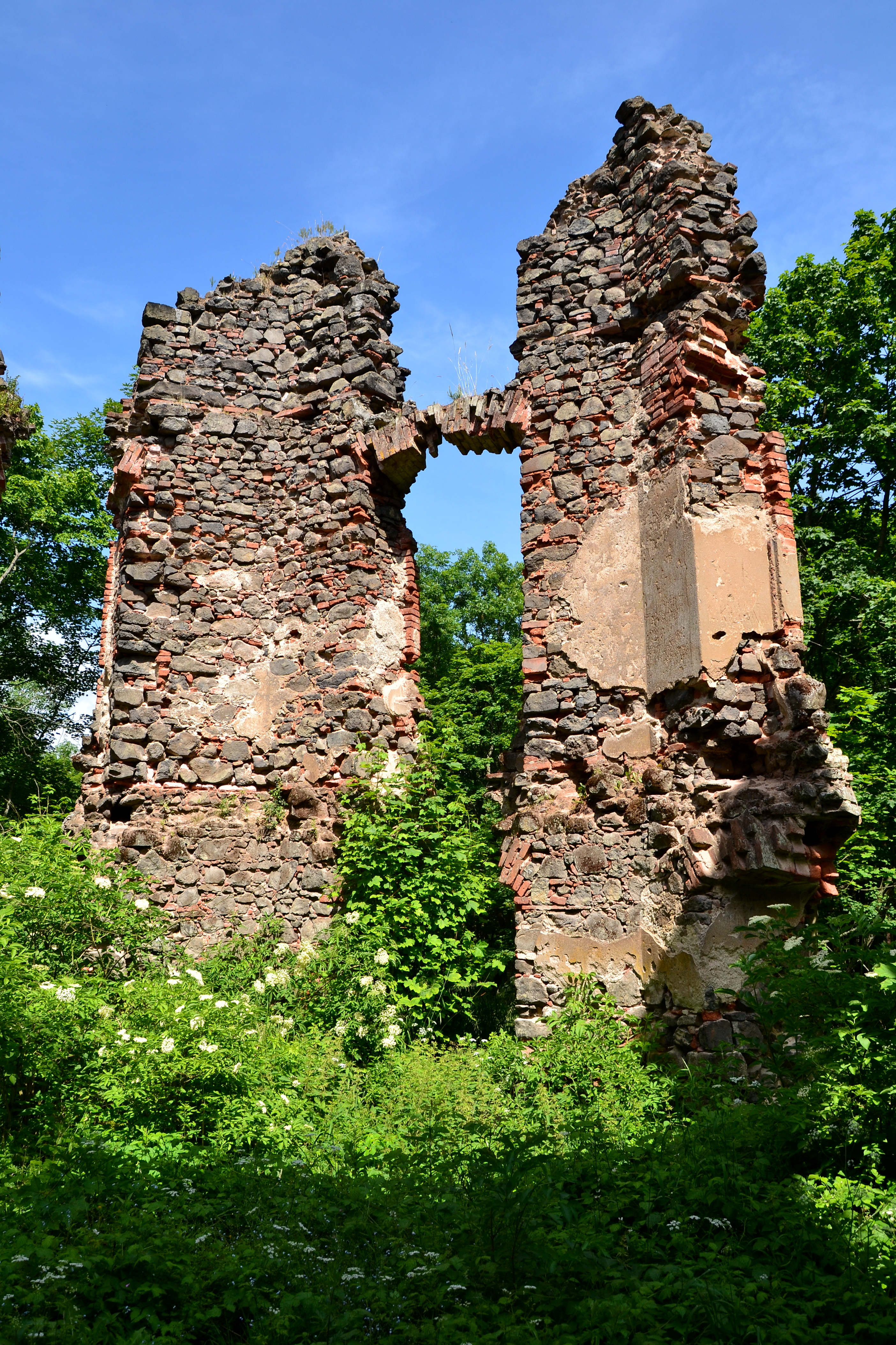 Lovecký zámeček Mořičov, Mořičov, interiér